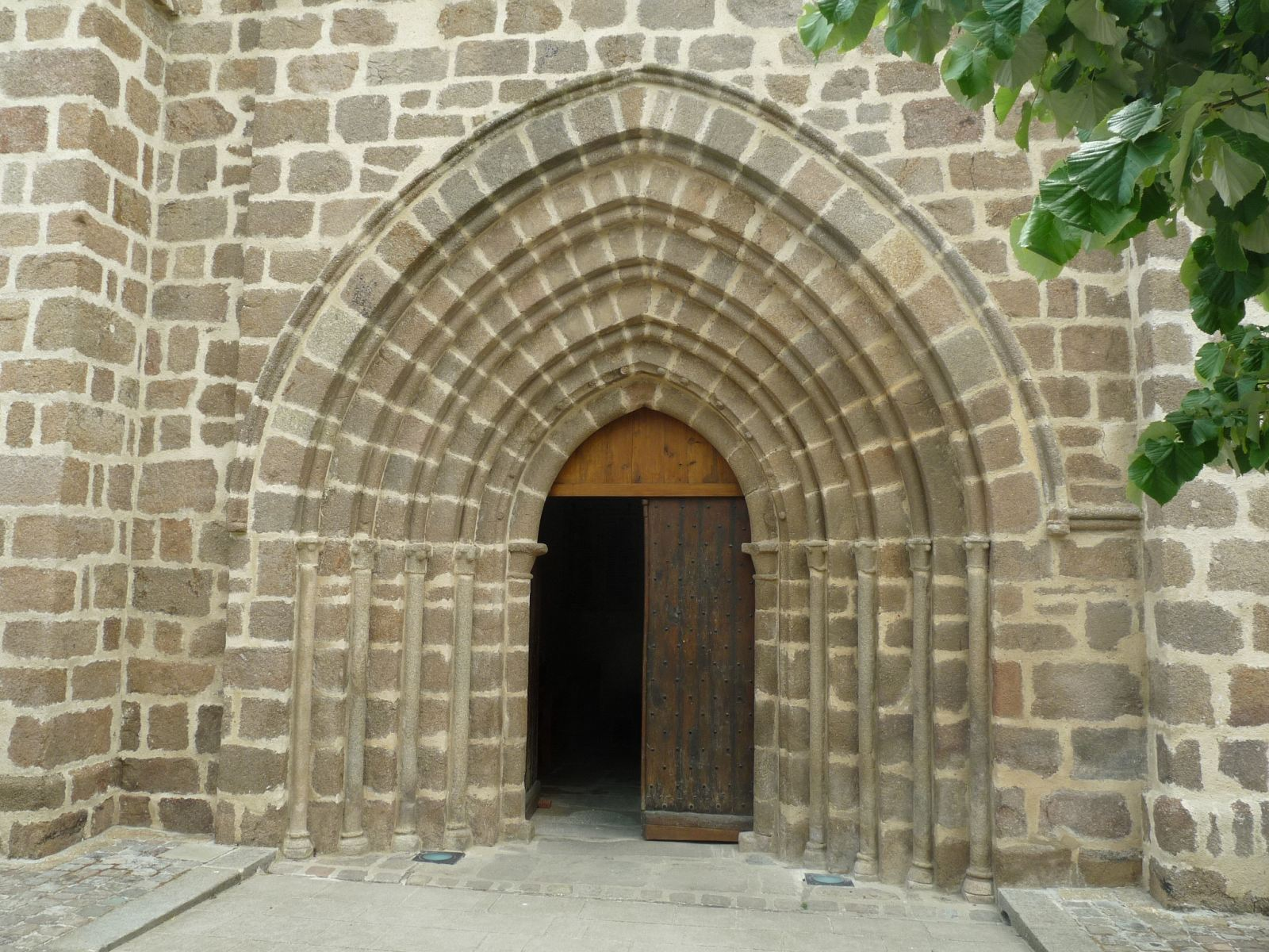 Portail de l'église de Brillac (Charente, France)